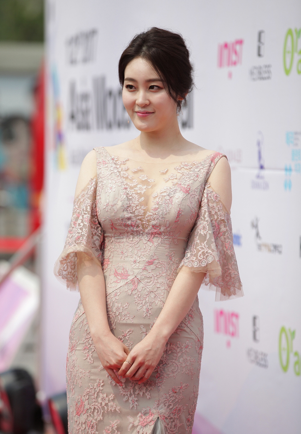 2017 아시아 모델 페스티벌 레드카펫